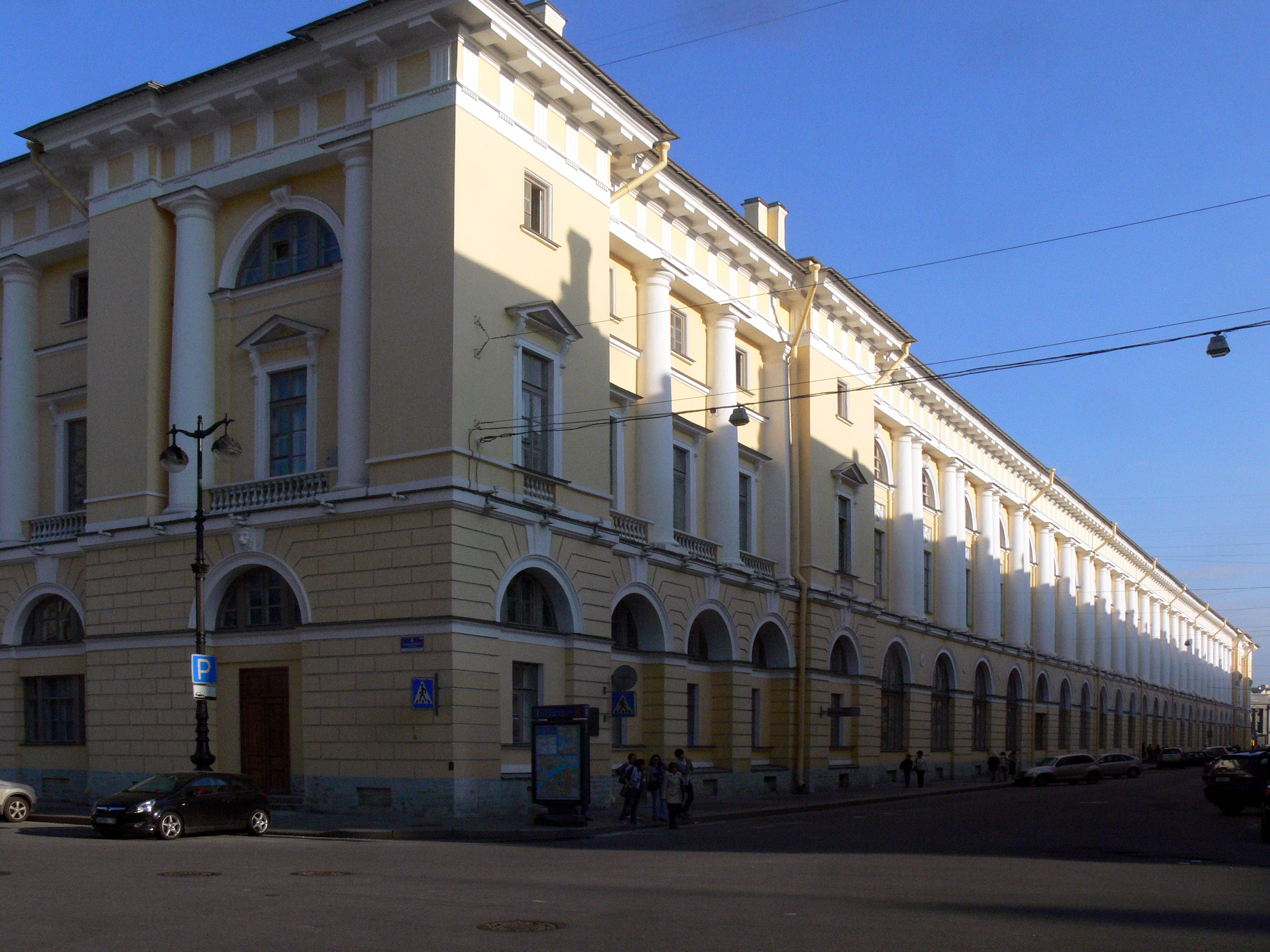 Waganowa-Ballettakademie in St. Petersburg.